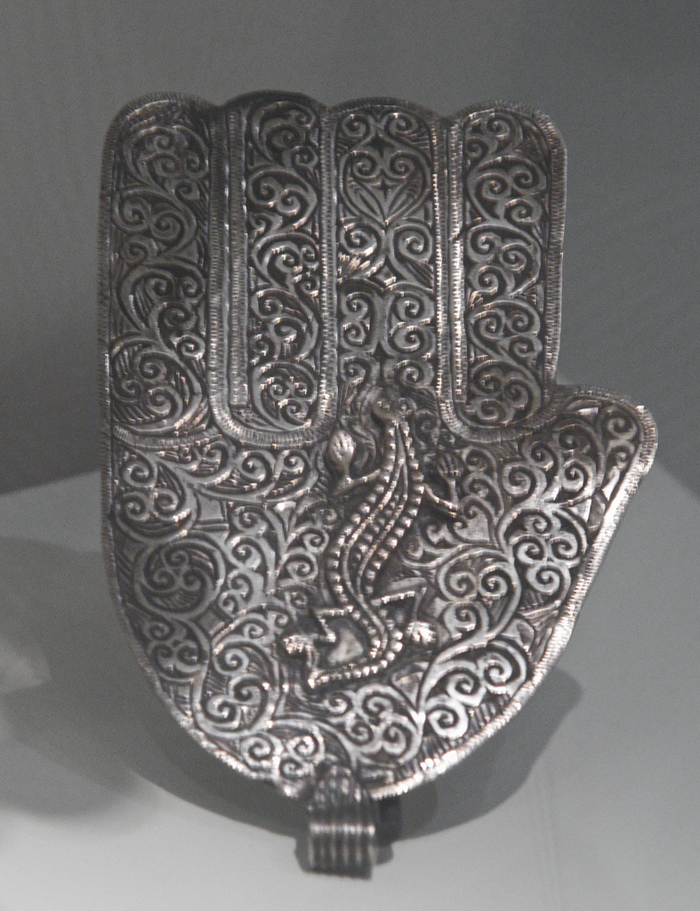 Handje Van Fatima (5070-1) Handje van Fatima